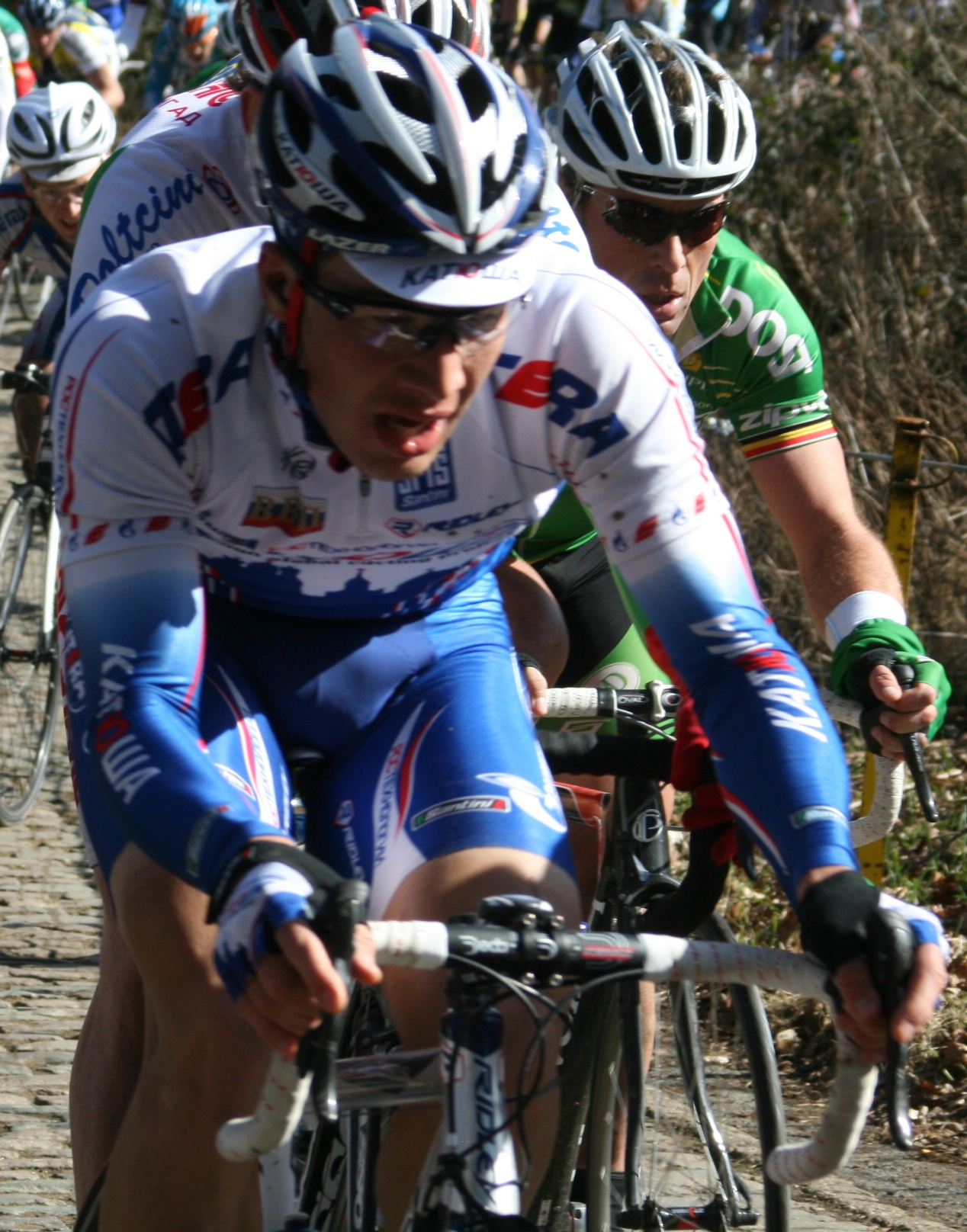 Denis Galimzyanov au mont Kemmel, lors des Trois jours de Flandre occidentale